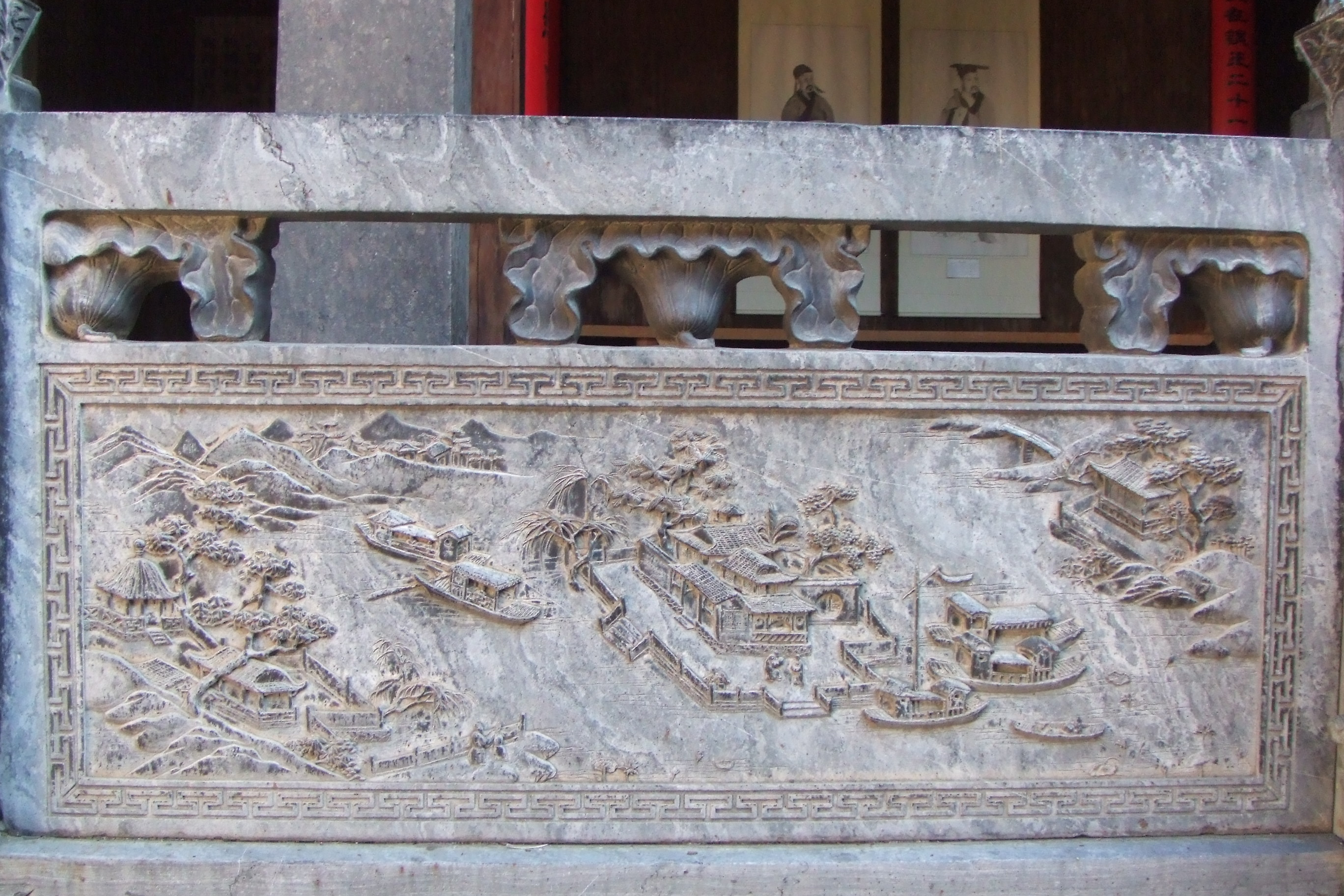 中國安徽省黃山市歙縣北岸鎮的吳氏宗祠，西湖全景之一（FinePix Z1富士通數碼相機/洪洋/ 2005/09/13）